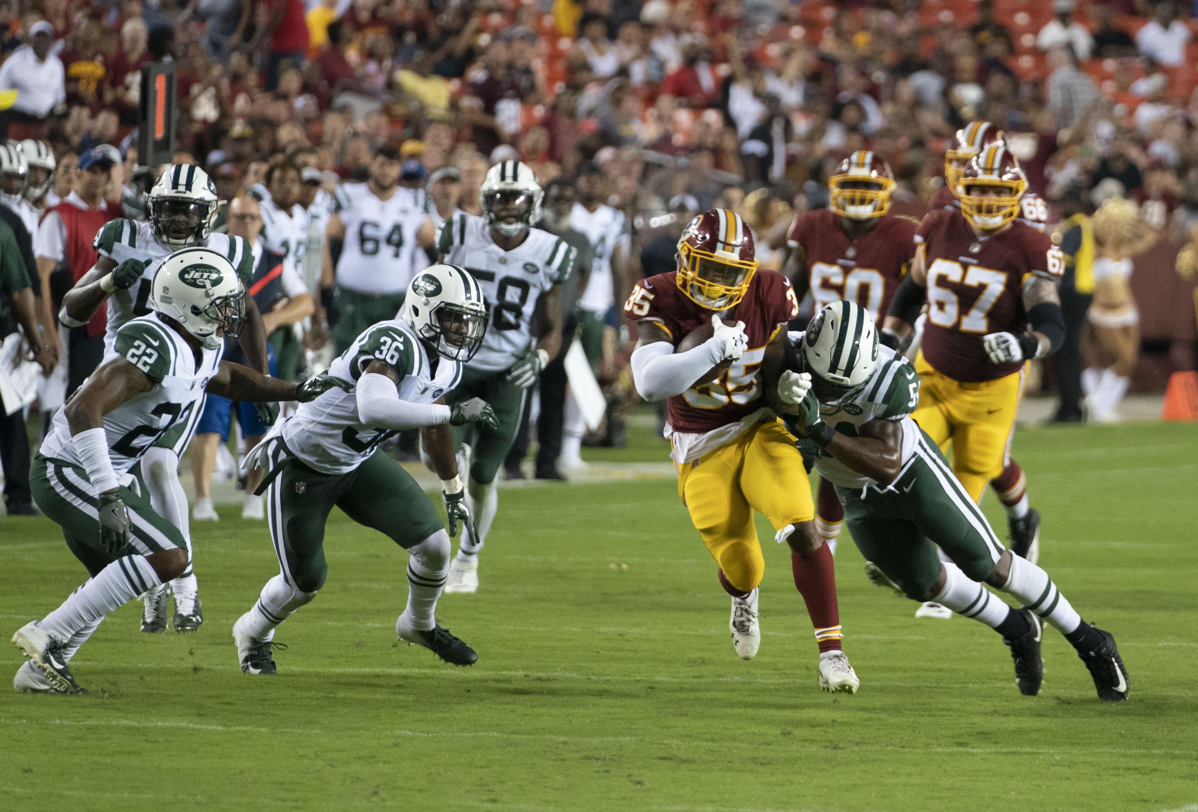 Jets at Redskins 8/16/18